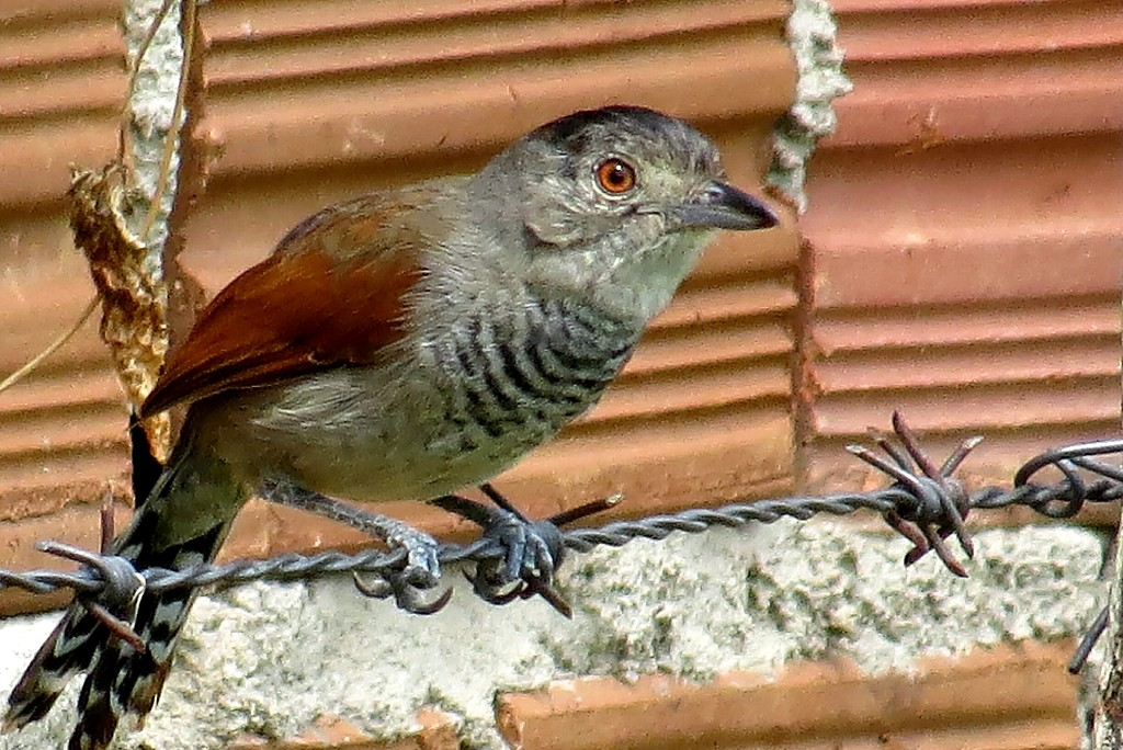 Choca-De-Asa-Vermelha Thamnophilus torquatus Swainson, 1825 Assunto(s): Ave Sexo: Macho Idade: Adulto Autor: Murilo Nascimento Local de Observação Município: Taquaritinga do Norte/PE Bioma Predominante: Caatinga Feita em: 13/09/2016 Câmera: Canon PowerShot SX50 HS Choca-de-asa-vermelha A choca-de-asa-vermelha é uma ave passeriforme da família Thamnophilidae. Nome Científico Seu nome científico significa: do (grego) thamnos = arbusto; e -philos = que adora, que ama; e do (latim) torquatus, torques = com colar, colarinho, colar. ⇒ (Pássaro) com colar que adora os arbustos. Características Mede cerca de 14 centímetros de comprimento e pesa entre 18 e 20 gramas. Com asas acastanhadas e a face de coloração cinza, esta espécie apresenta dimorfismo sexual acentuado. A cabeça do macho da espécie apresenta a coroa com uma pequena crista de coloração preta e na fêmea esta coroa com crista é castanha. Quando em situação de alerta mantém a crista eriçada. Na porção posterior ao olho tem uma fina estria pós ocular de coloração escura. Peito do macho apresenta-se barrado e o da fêmea é castanho e quase totalmente liso, apresentando barrado bastante insipiente. O ventre e os flacos são cinza-pardacento. A cauda do macho é preta e apresenta as pontas das retrizes de coloração branca. A cauda da fêmea é castanha. Bico forte de coloração cinzenta, tarsos e pés são cinzentos e a íris de ambos os sexos é vermelha . Subespécies Espécie monotípica (não são reconhecidas subespécies). Alimentação Hábitos alimentares… Insetos e pequenos vermes. Hábitos Habita matas de galeria, áreas de cerrado e caatinga. Distribuição Geográfica Ocorre no Brasil Central e no Nordeste.